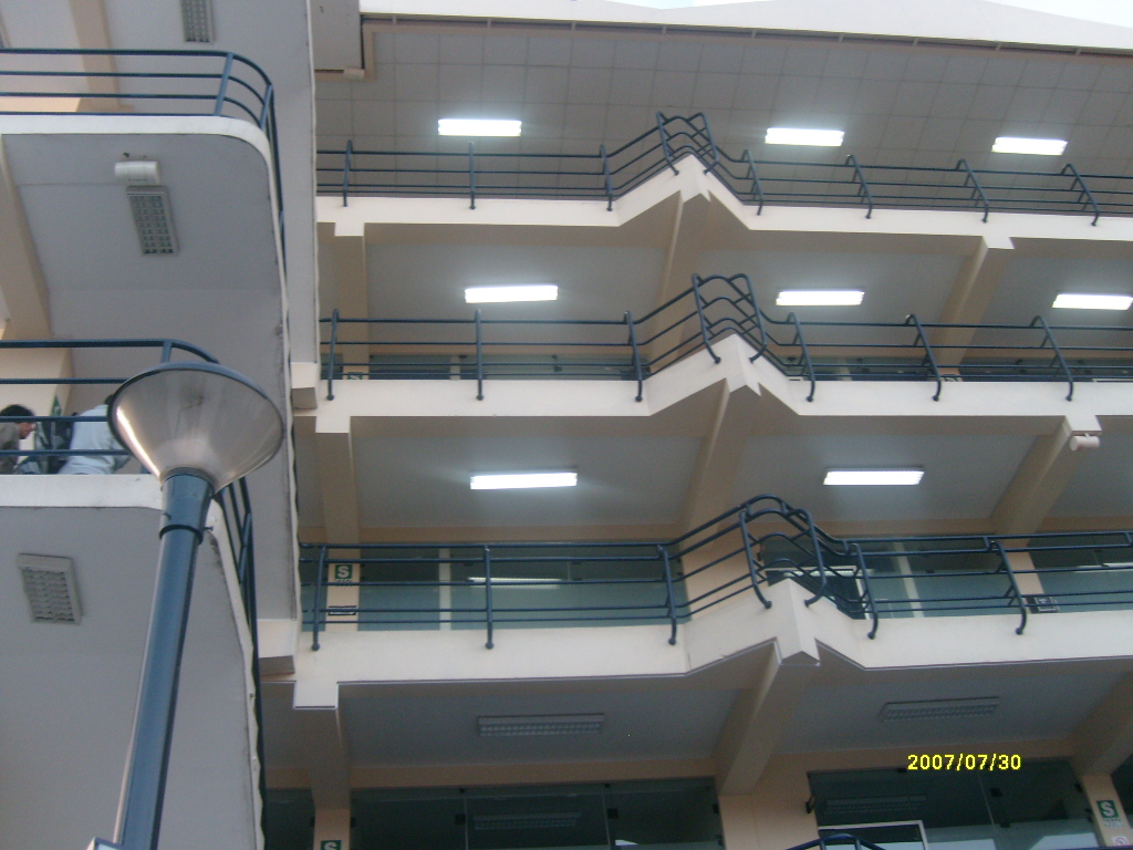 Universidad Continental - sede central